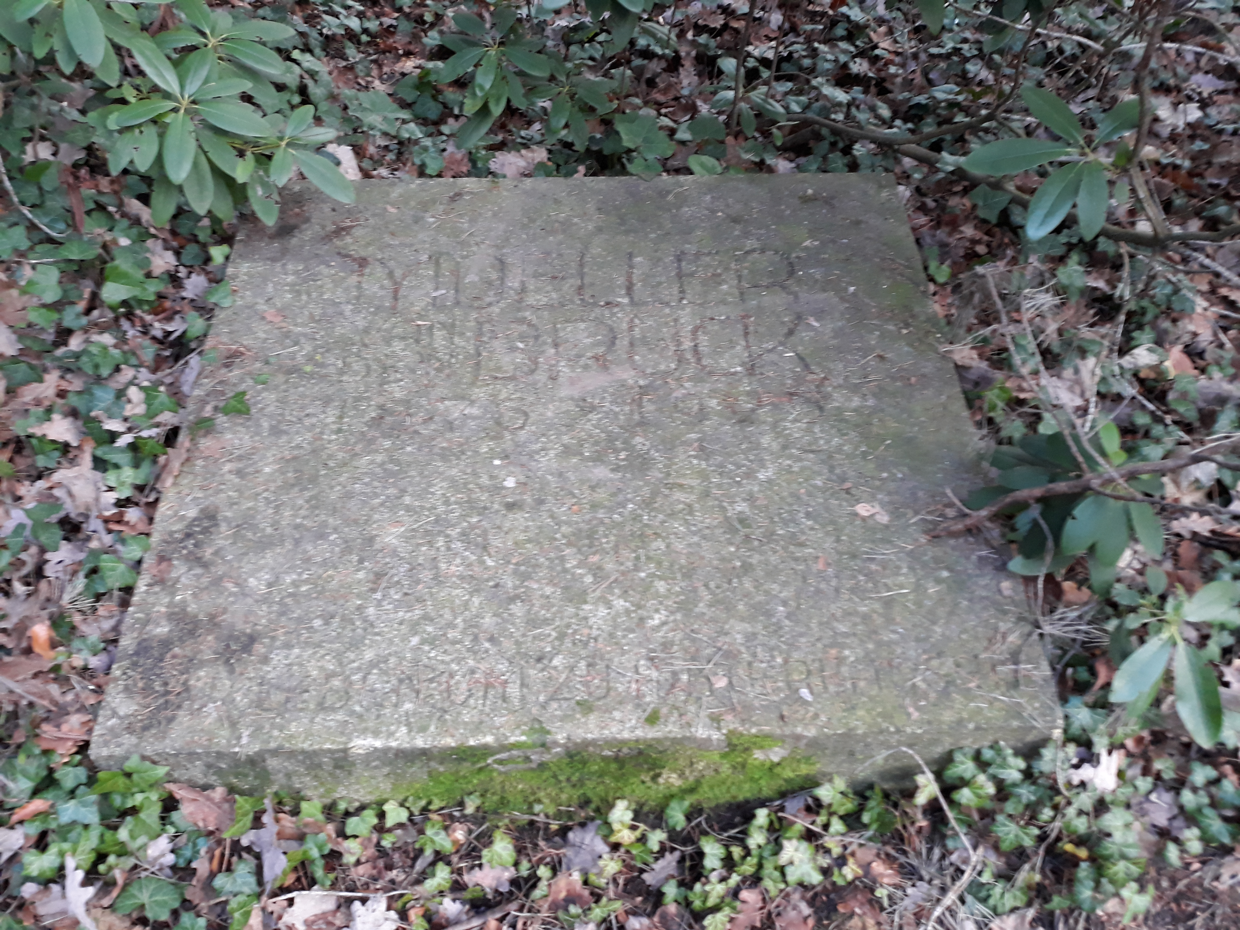 Das Grab des deutschen Schriftstellers und politischen Publizisten Arthur Moeller van den Bruck auf dem Parkfriedhof Lichterfelde in Berlin.